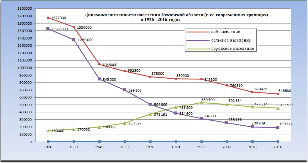 Динамика численности населения Псковской области в 1926 - 2016 годах (в современных границах)